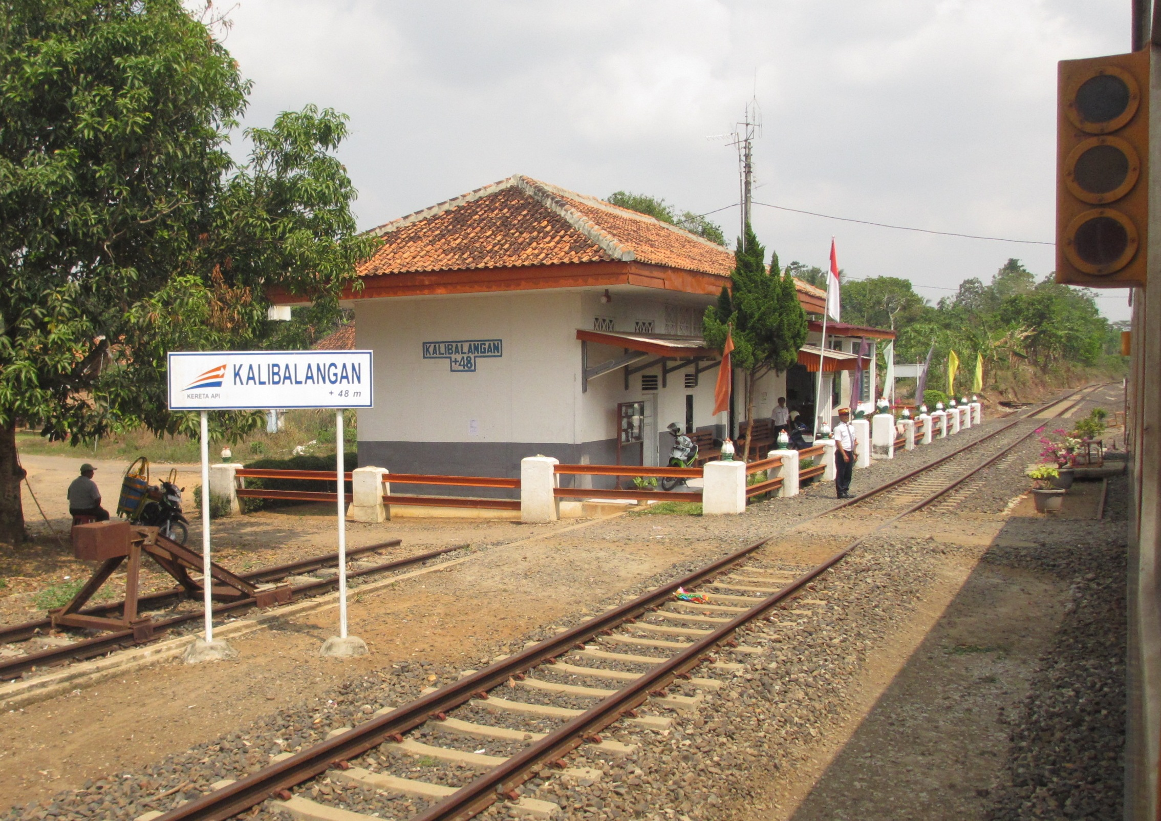 Stasiun Kalibalangan.